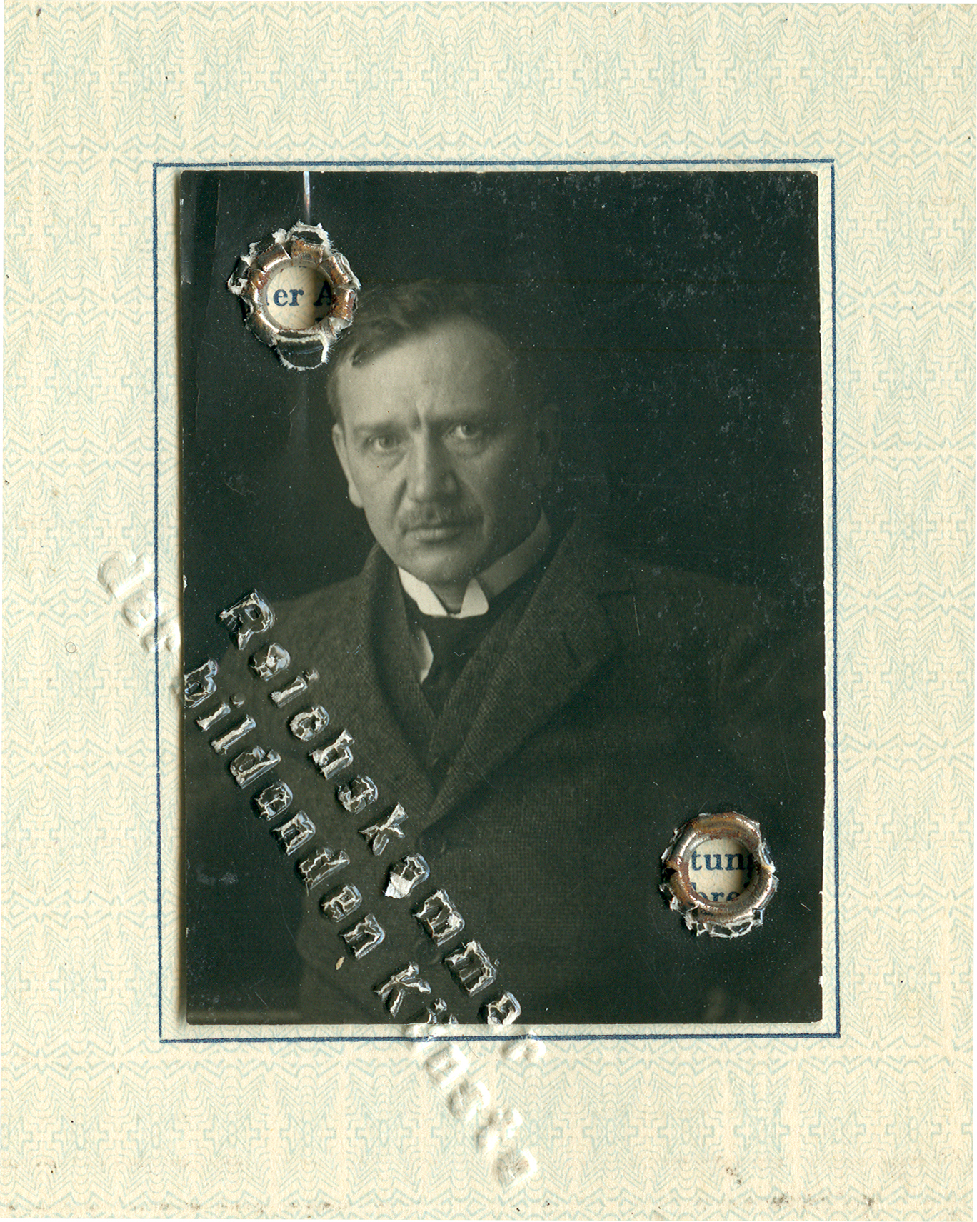 Ausweis Reichskulturkammer, Reichskammer der bildenden Künste, Fachverband Bund Deutscher Bildhauer; Ausschnitt von Seite 7 mit dem Portraitfoto von Georg Herting